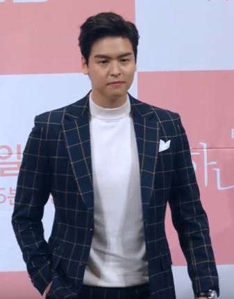 12일 오후 서울시 강남구 논현동 임피리얼팰리스 서울 호텔에서 KBS 새 주말드라마 '하나뿐인 내편'의 제작발표회가 열렸다.